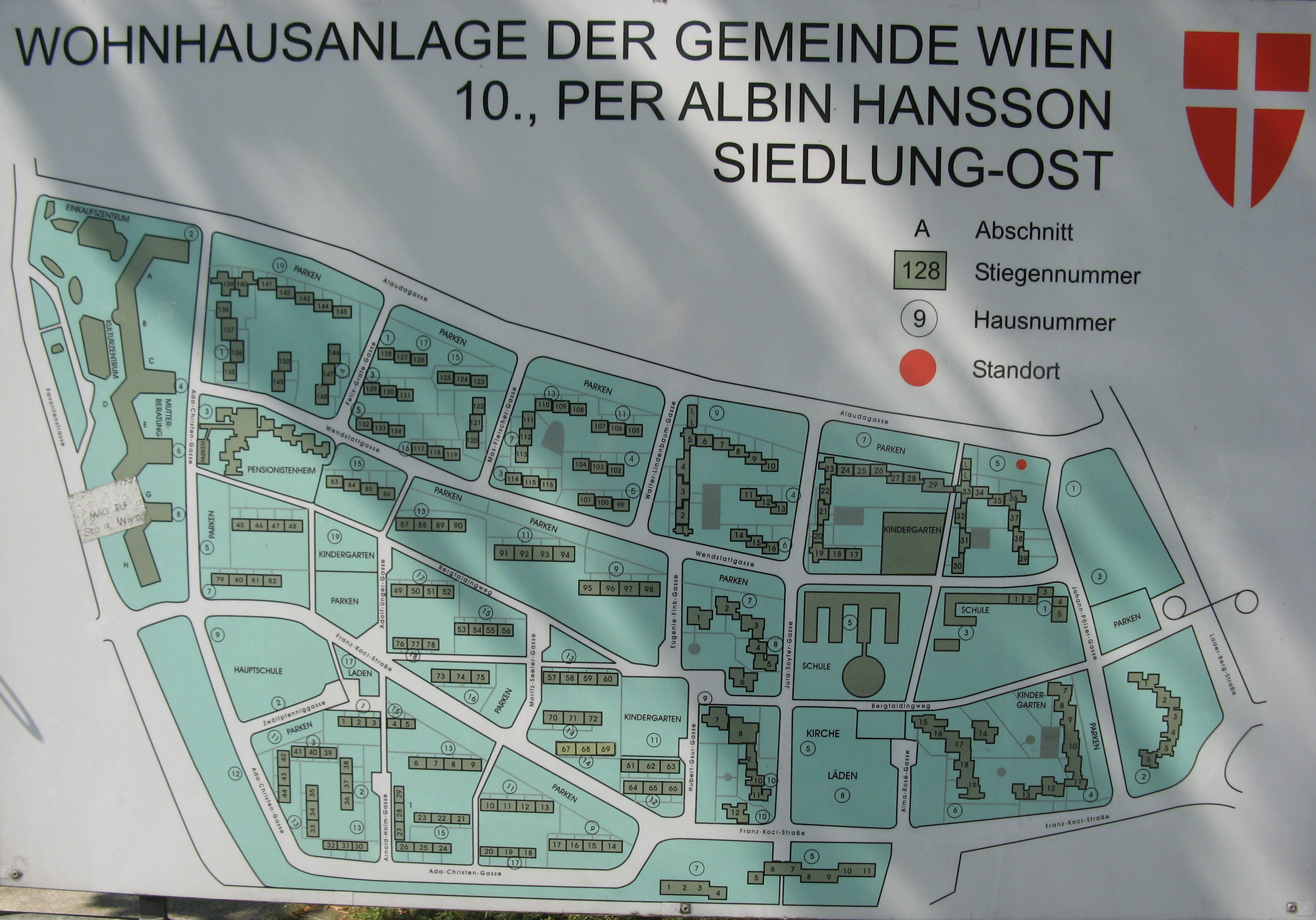 Lageplan der Per-Albin-Hansson-Siedlung Ost, Wien-Favoriten